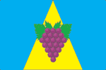 Флаг Ахтанизовского сельского поселения, Краснодарский край, Россия.